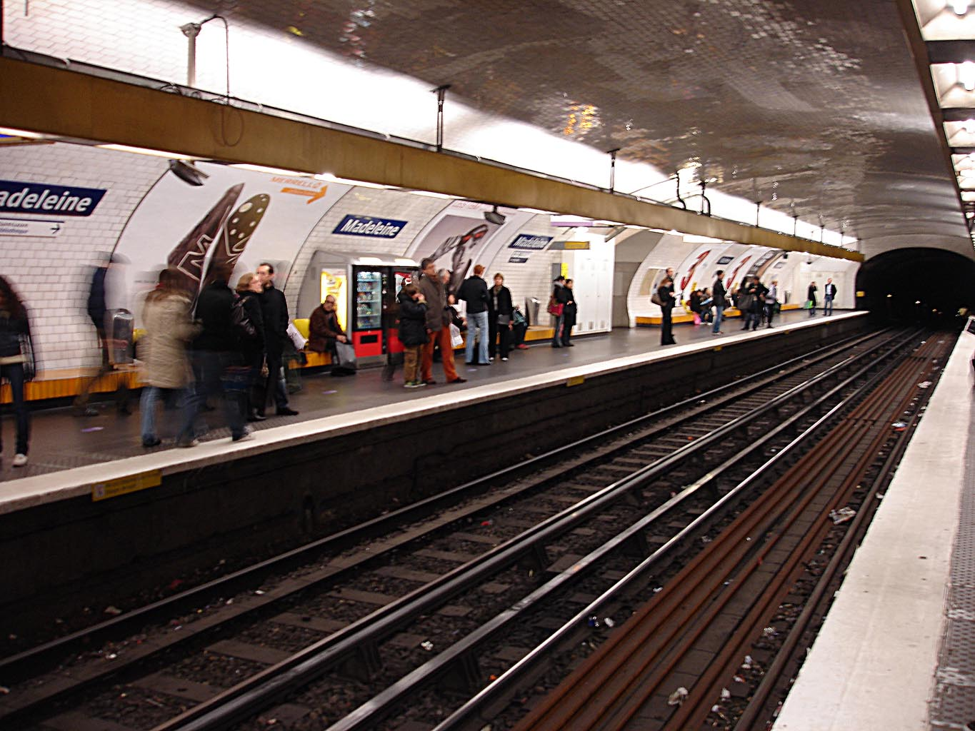 Métro de Paris - ligne 8 - Station Madeleine (France)